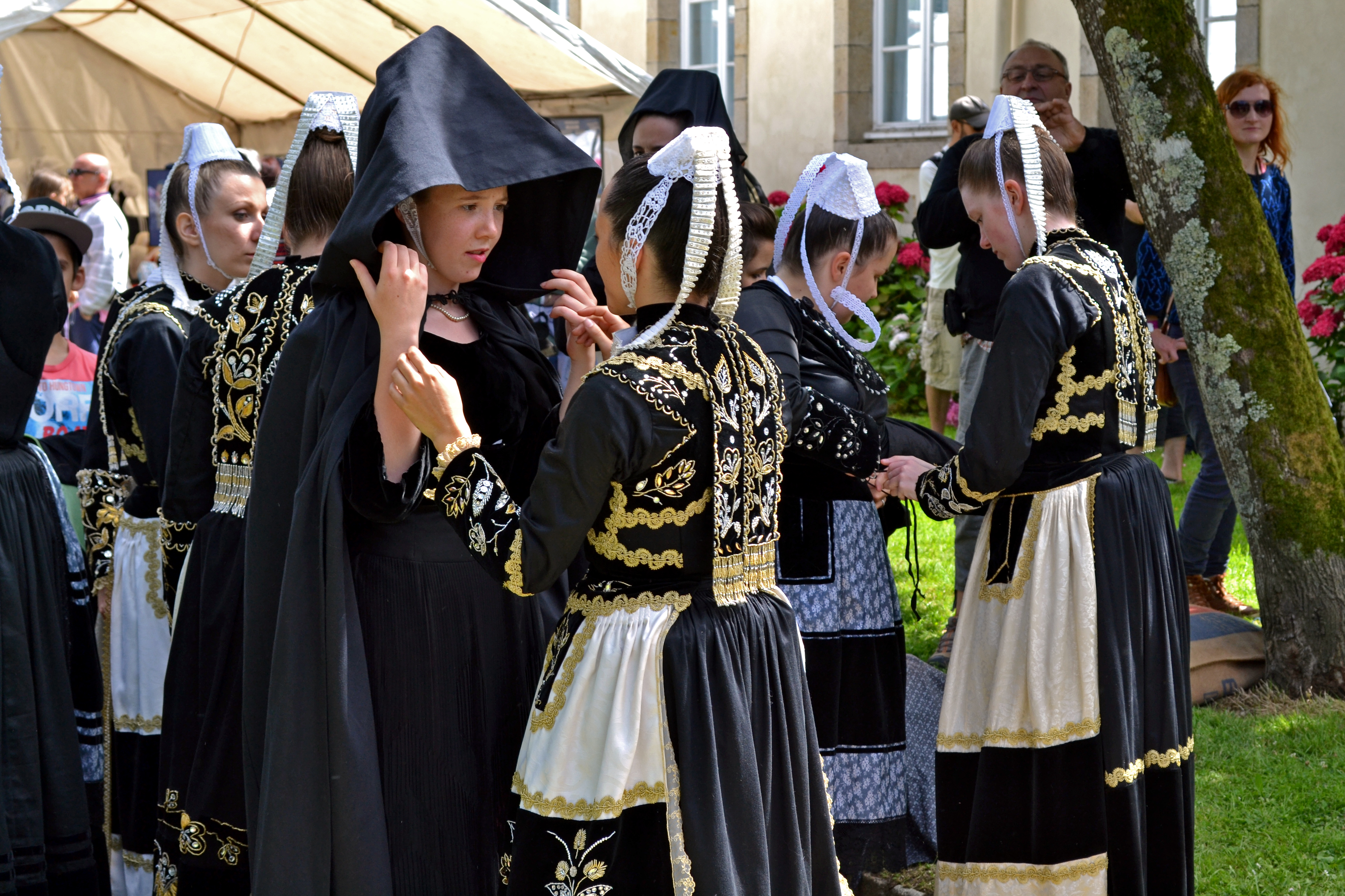 Costumes bretons lors de la Fête des Brodeuses 2014.